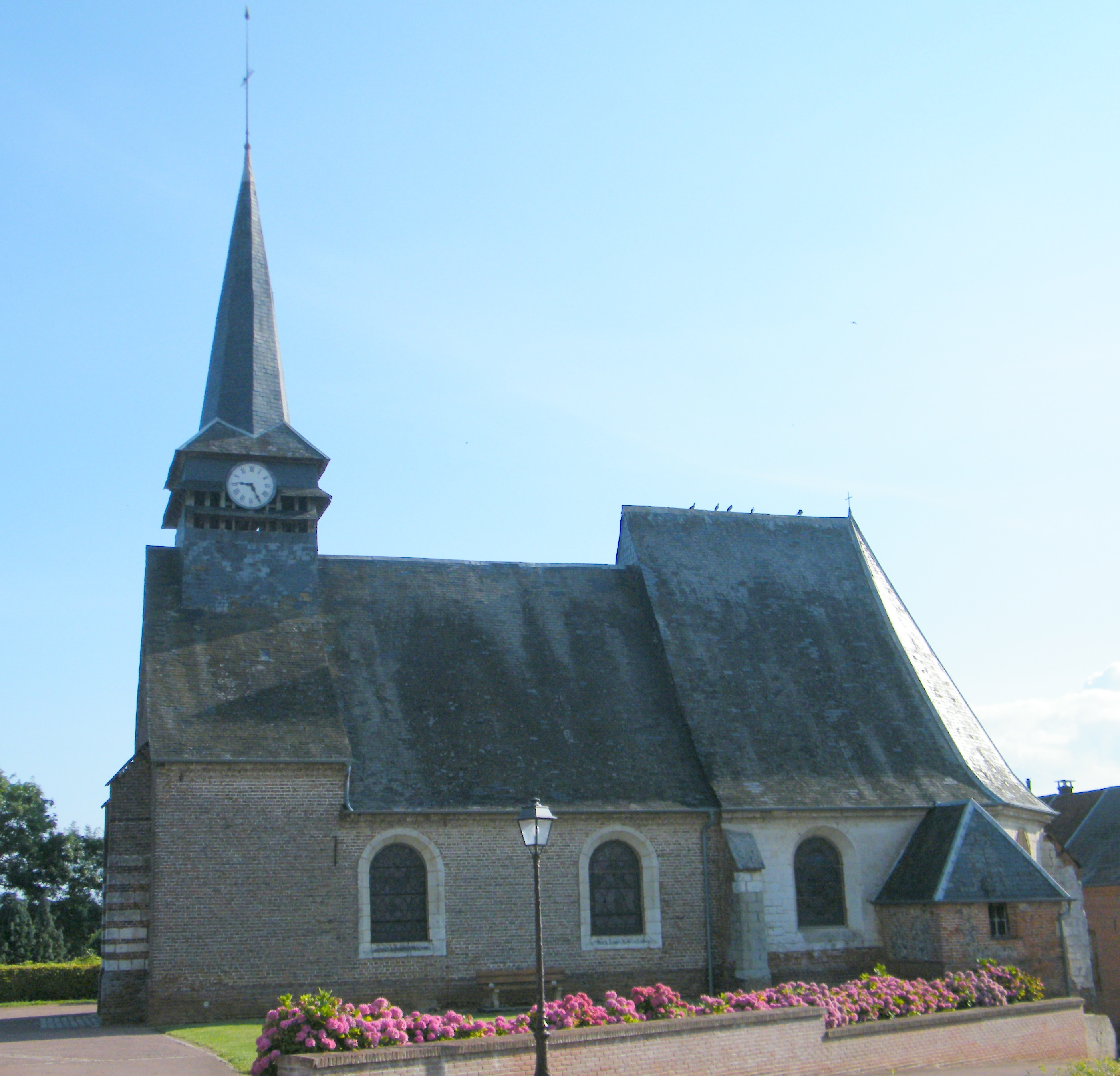 L'église Notre-Dame-de-l'Assomption de Dromesnil, Somme, France.